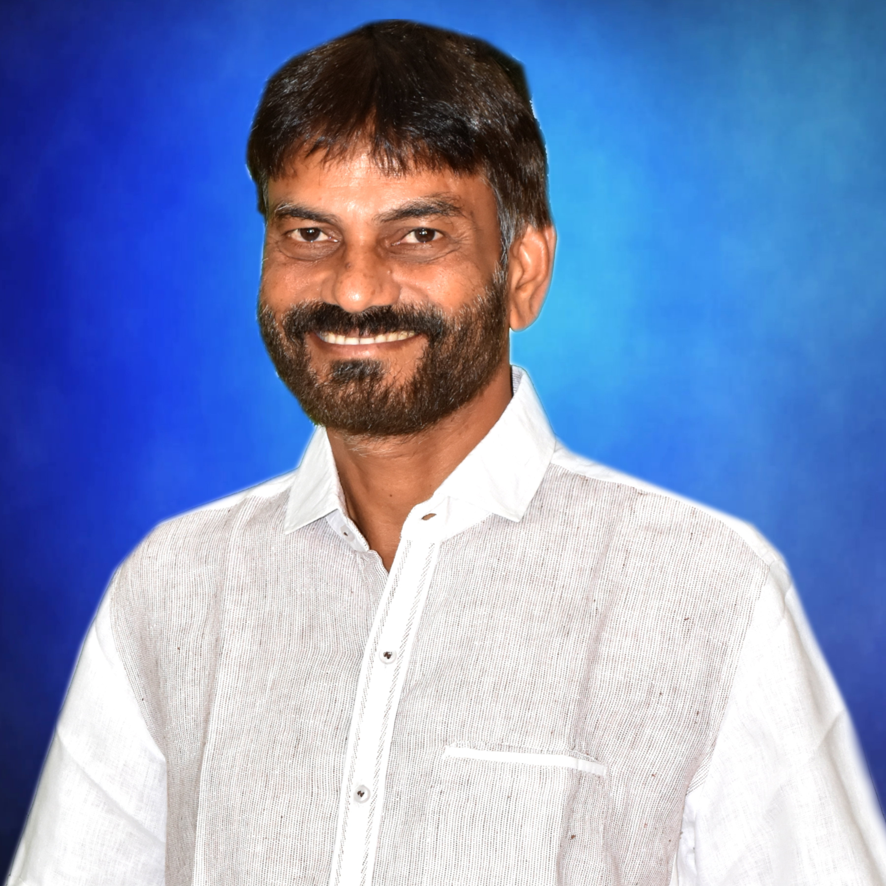 Tentu Satyanarayana